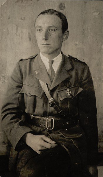 Леонид Иванович Байдак, русский лётчик, участник Белого движения, георгиевский кавалер. Полковник Королевских ВВС Югославии, командир 1-го авиационного полка ВВС КОНР.